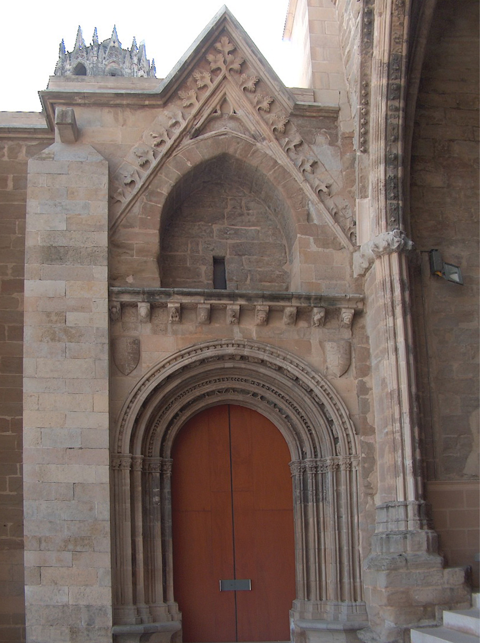 Sé Velha de Lérida. Sé Velha de Lérida em Espanha.